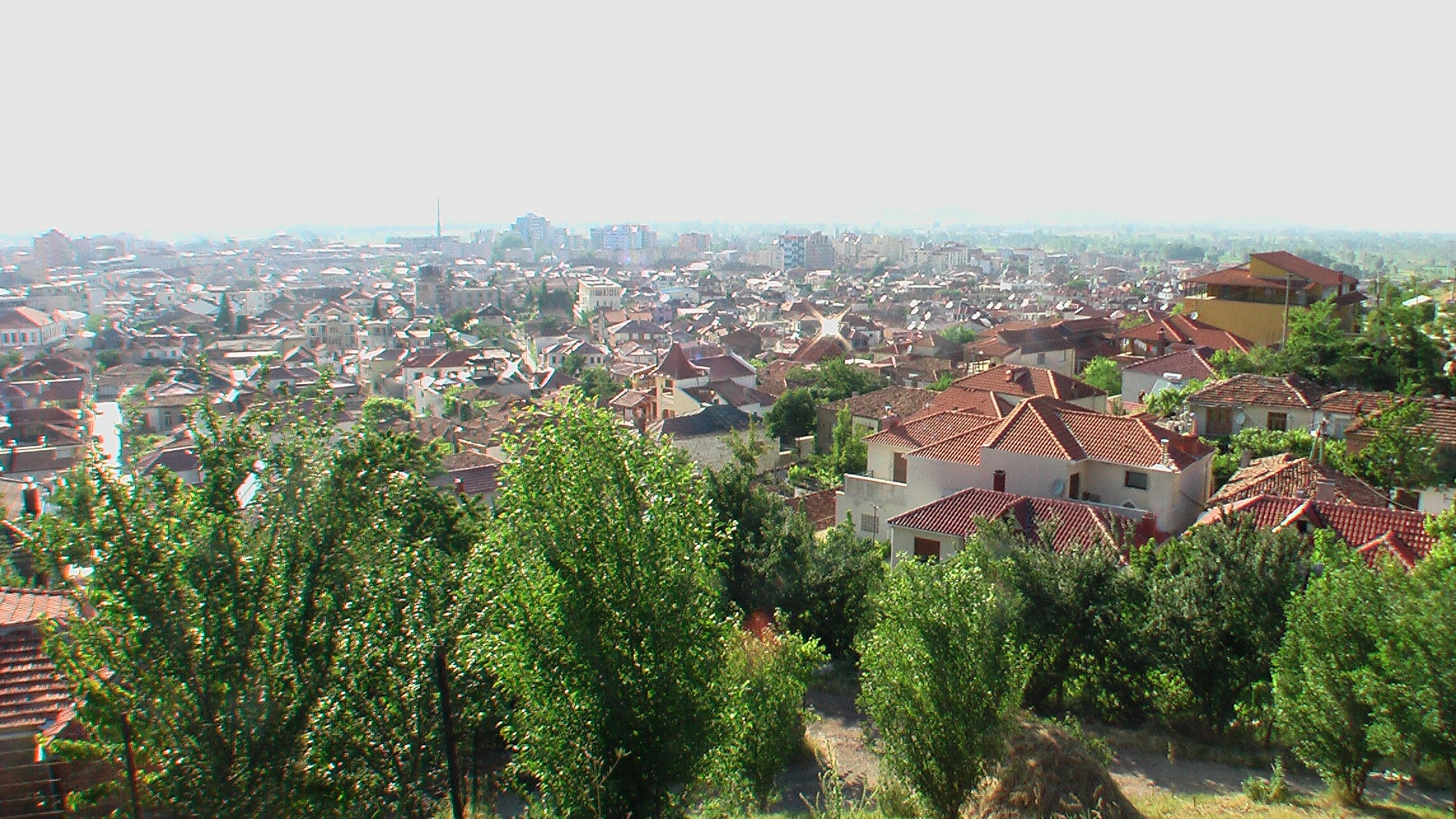 KorçaVonOben